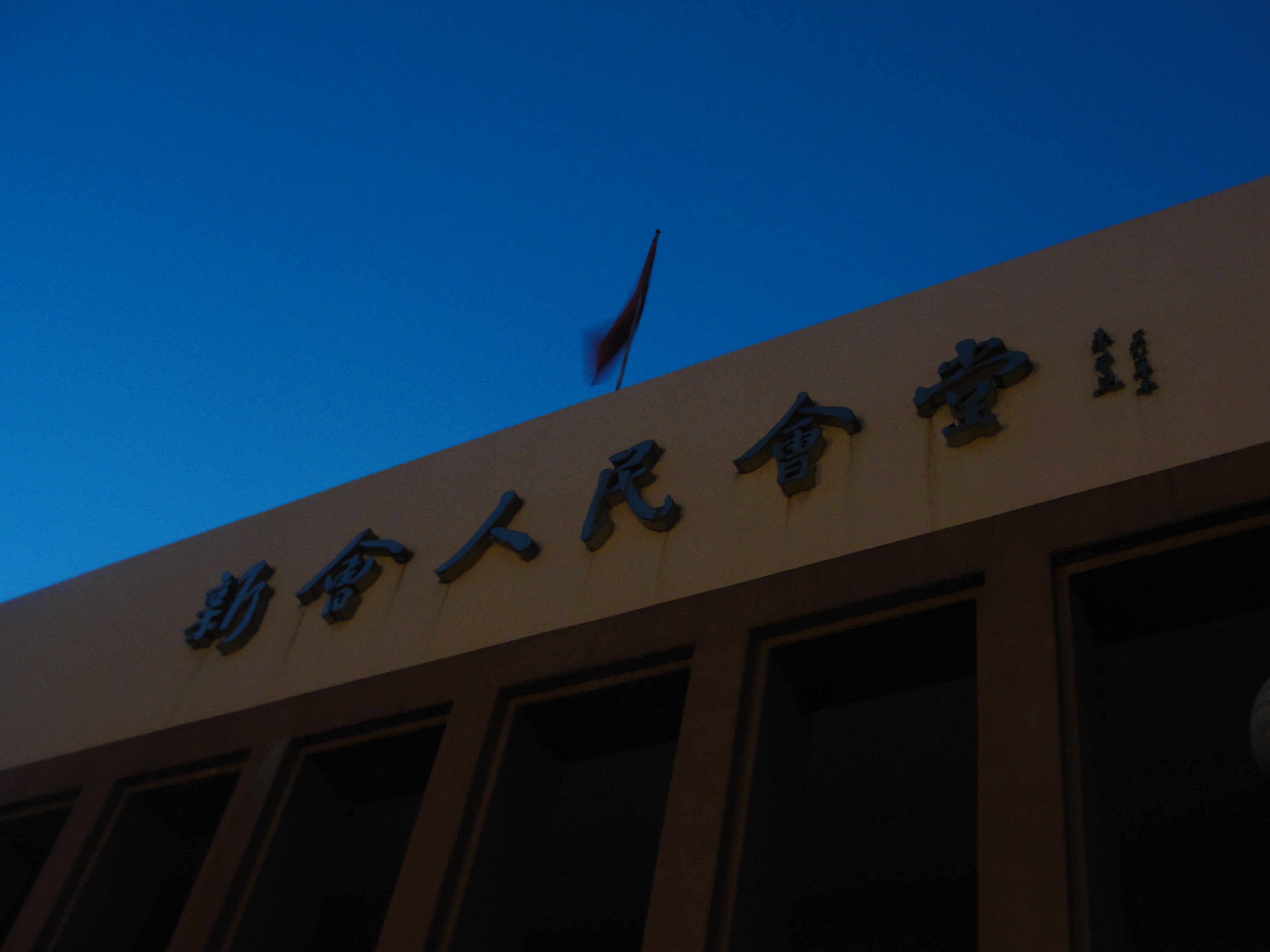 中文（中国大陆）: 新会人民会堂是重要的地标，同时，其前面的广场也是新会非常重要的休闲胜地